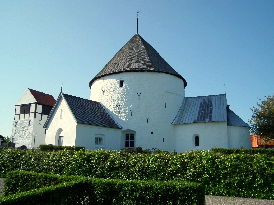 Nylars - rotunda